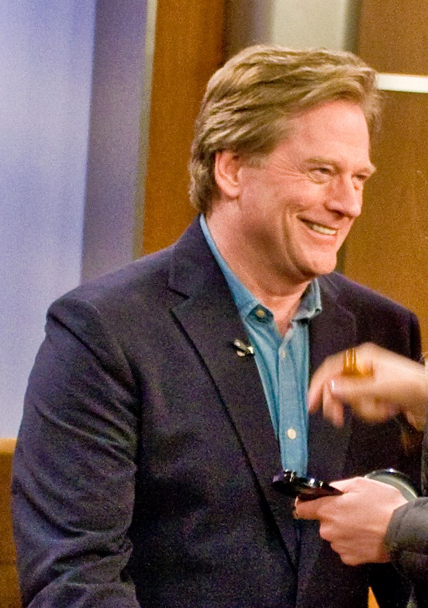 Dean Butler en 2014